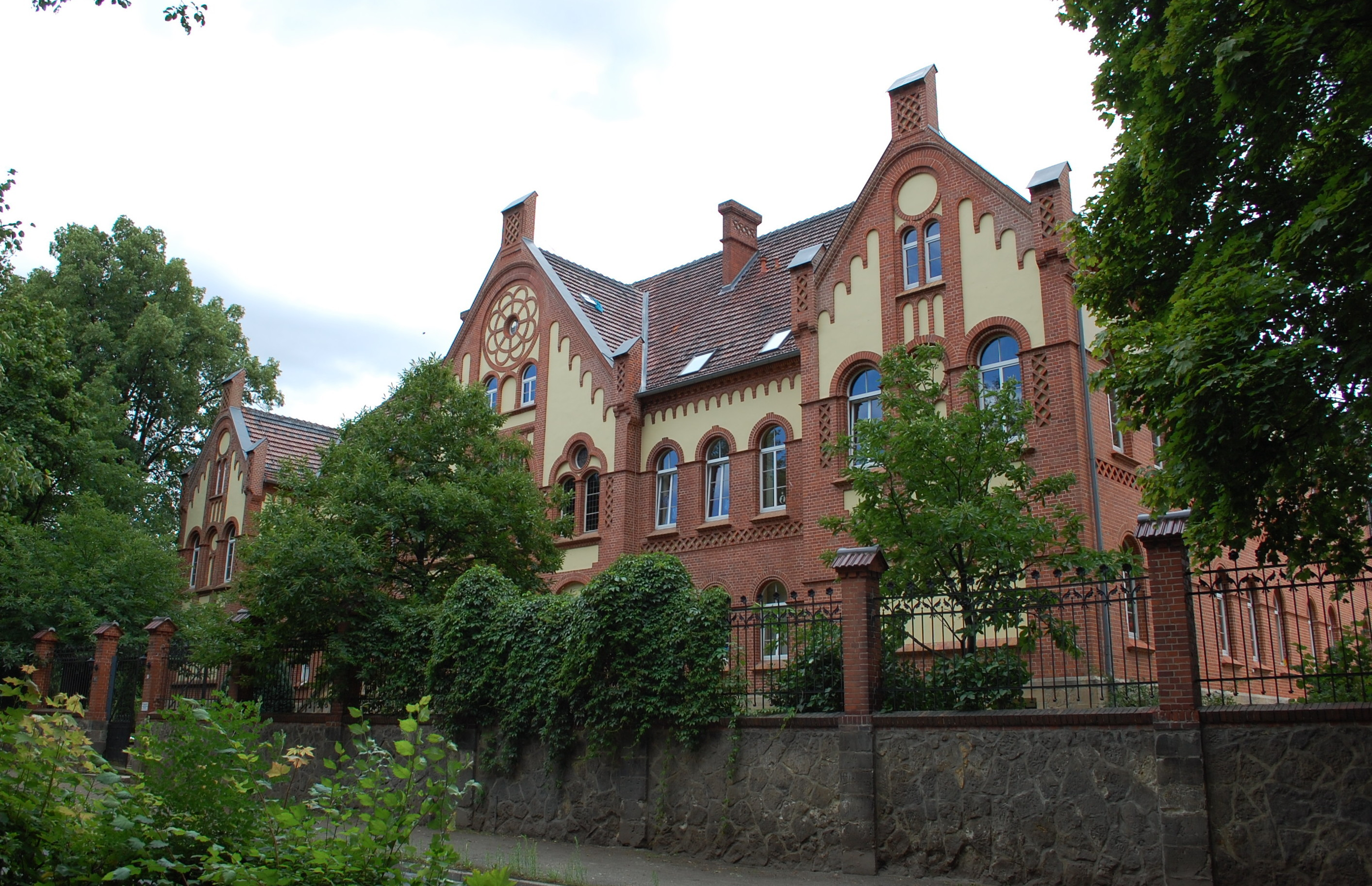 Haus Stresemannstraße 9-11 in Quedlinburg, Straßenfront